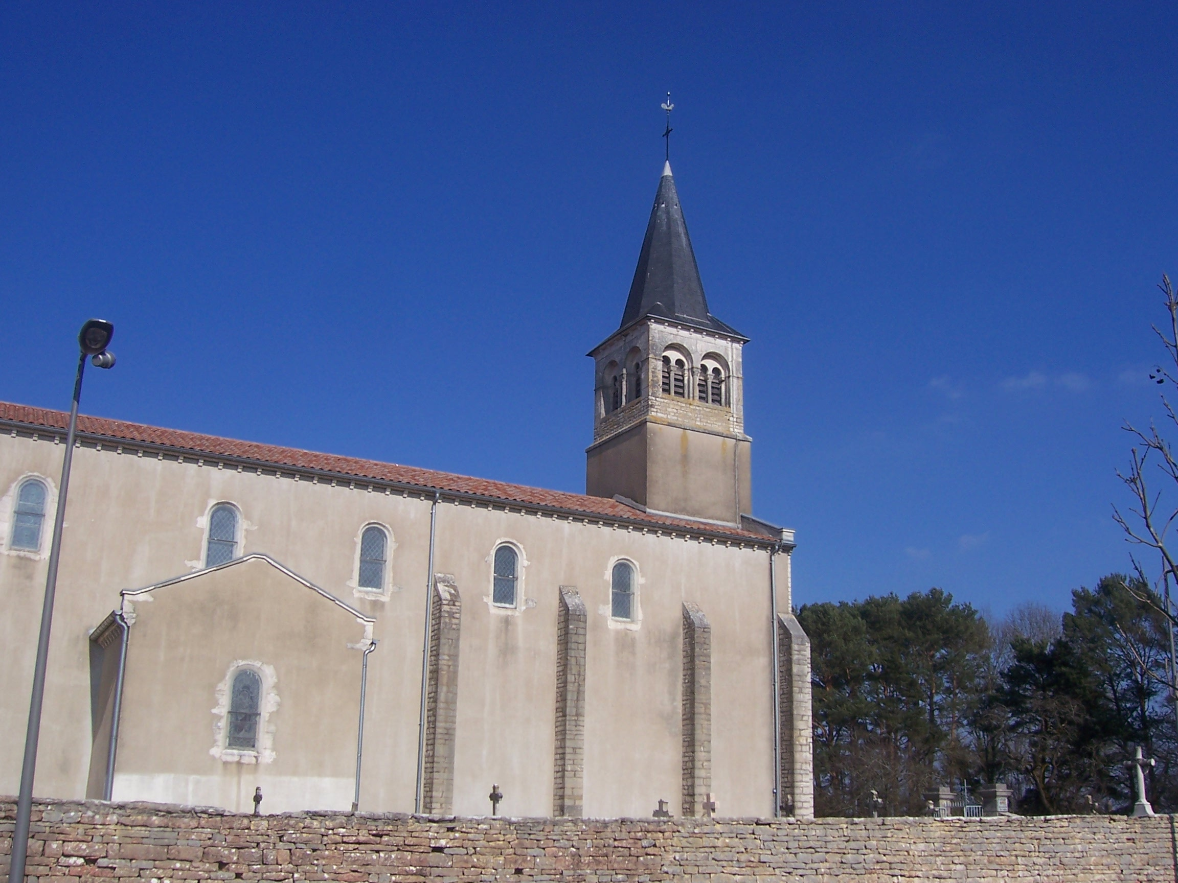 Eglise de Châtenoy-le-Royal